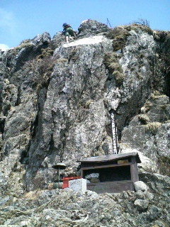 大峯奥駈道・大峰山（山上ヶ岳）の行場である西ノ覗